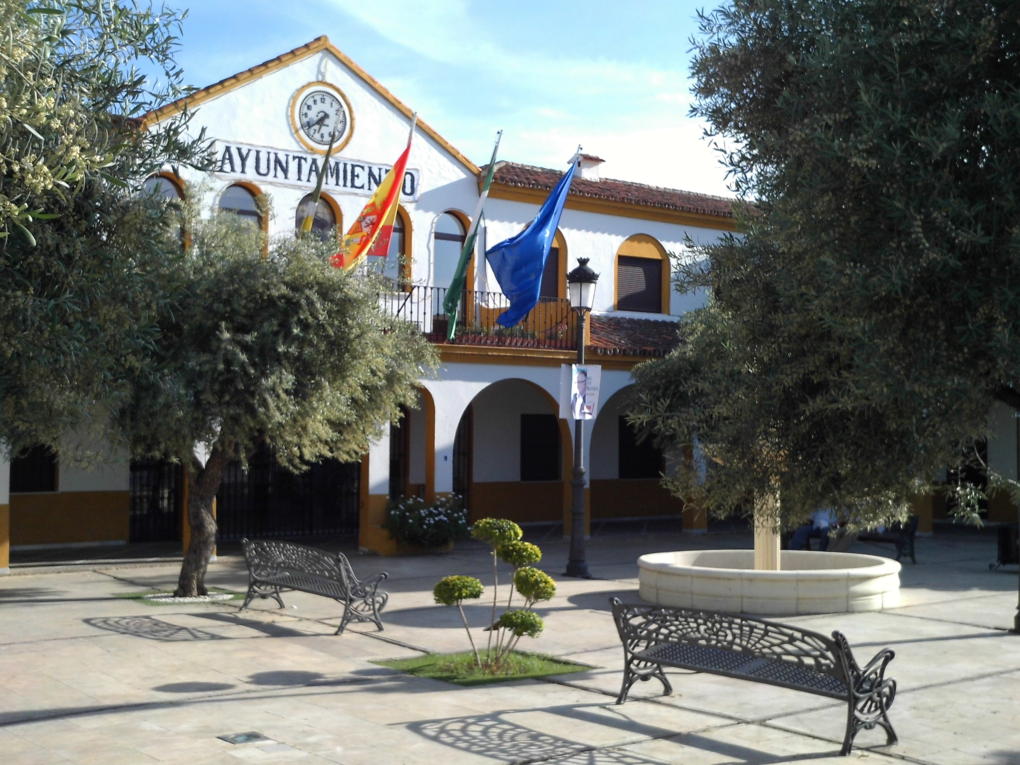 Plaza de Andalucía de Bormujos, donde se encuentra el ayuntamiento